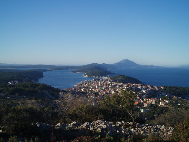 Město Mali Lošinj v Chorvatsku